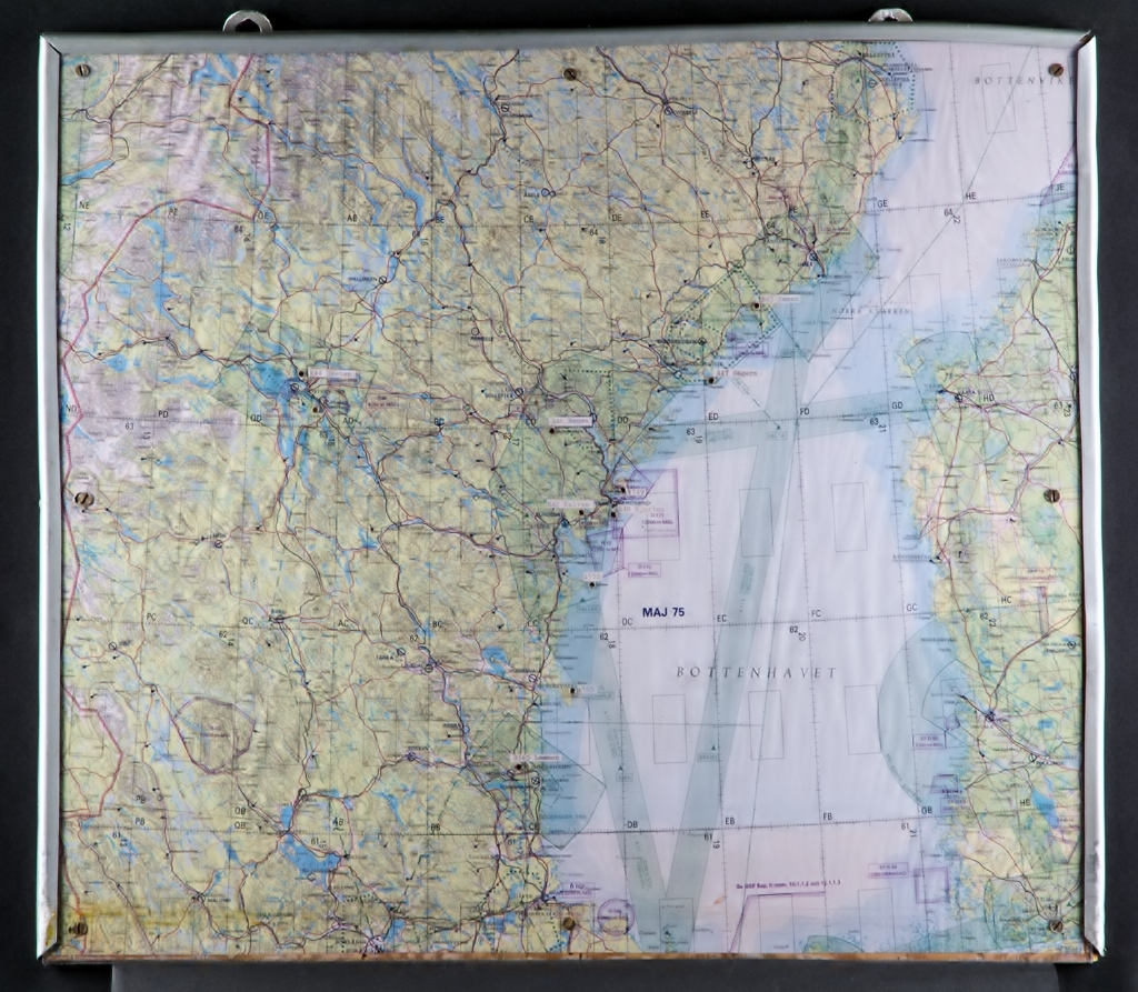 Karta för LFC "Humlan" baserad på F 4 Frösön, över Nedre Norrlands militärområde (Milo NN). På kartan är det utmärkt med radarsektorer för R44 Räven (Frösön), R43 Gamen (Umeå), R46 Renen (Kramfors) R42 Kalven (Sundsvall), R40 Hjorten (Härnösand) och R160 (Söderhamn).